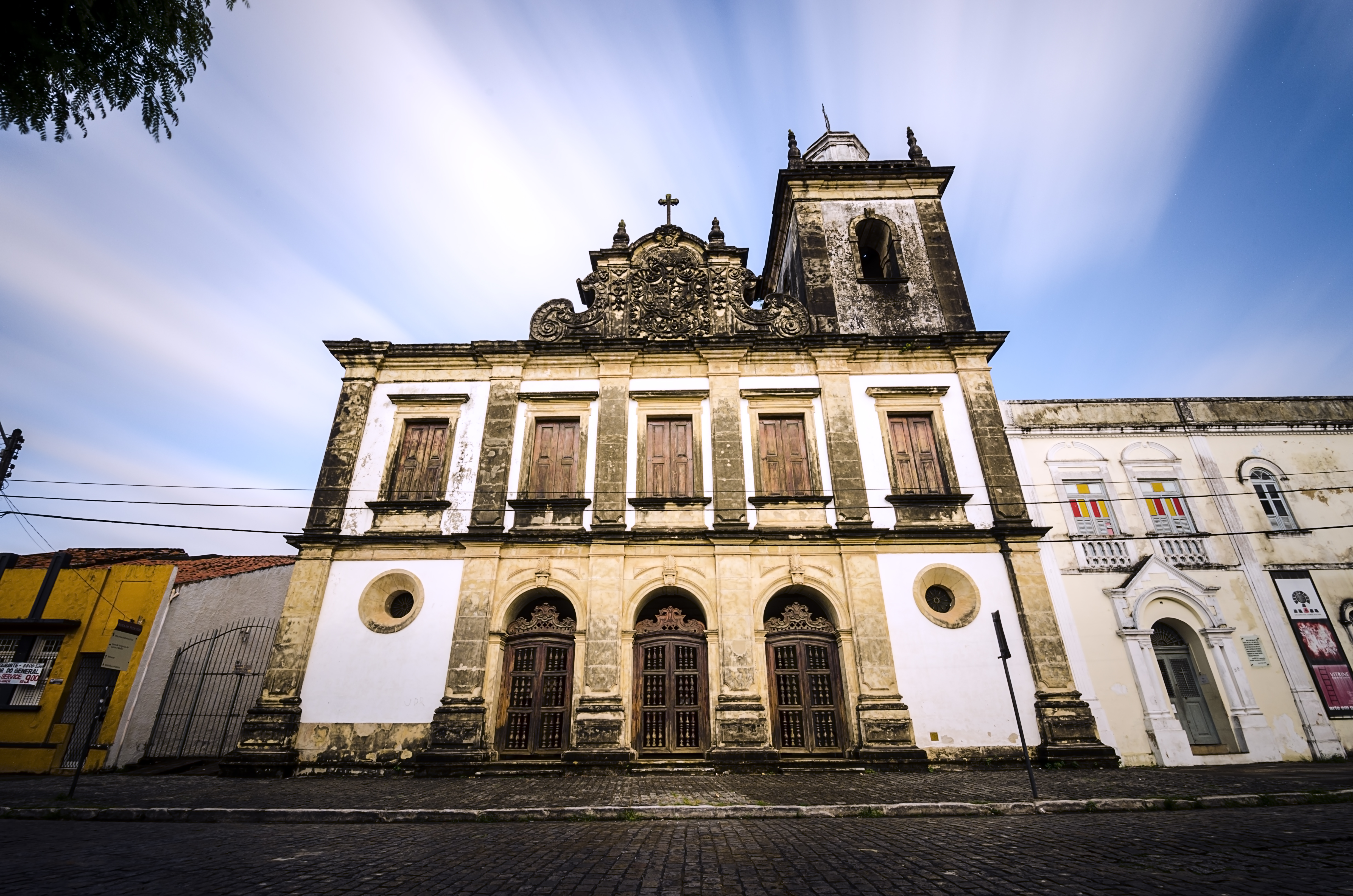 Igreja de São Bento